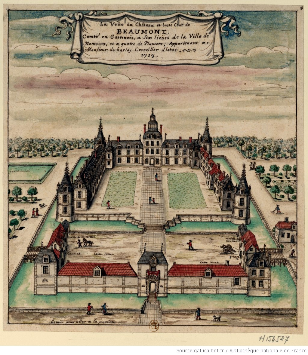 La Veüe du Chasteau et basse Cour de Beaumont, Comté en Gastinois, à Six lieües de la Ville de Nemours et a quatre de Pluviers; Appartenant à Monsieur de harlay Conseiller d'Estat.